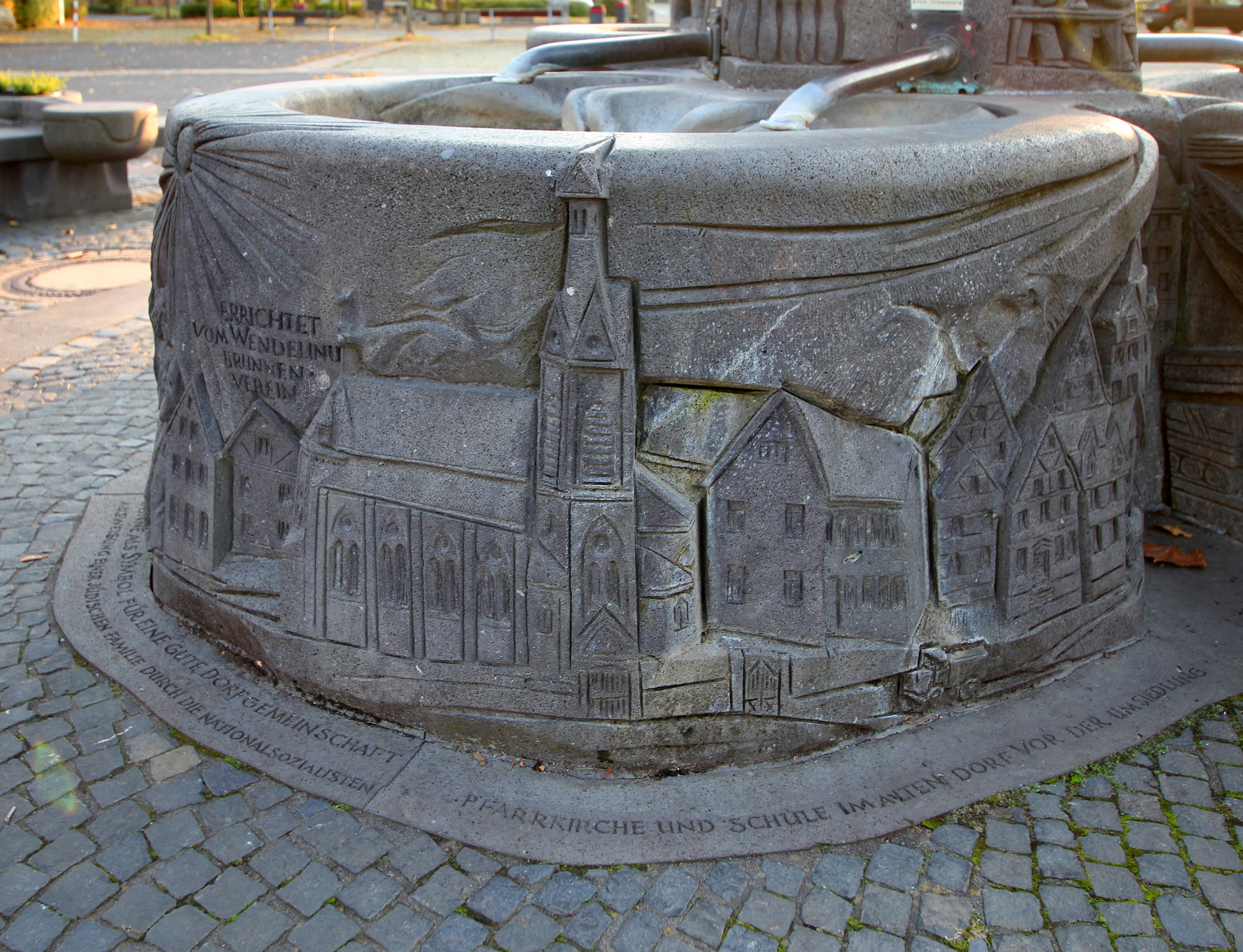 Hürth-Berrenrath, Markt. Ein Sockeldetail des von Paul Milles entworfenen Wendelinusbrunnens zeigt Alt-Sankt-Wendelin inmitten der alten Ortschaft. Mit der Darstellung der um den Brunnenrand abknickenden Kirchturmspitze erinnerte der Künstler an deren Abbruch wegen Baufälligkeit im Jahr 1952. Wegen der absehbaren Niederlegung der Kirche, die dann 1959 erfolgte, wurde von einer Sanierung abgesehen und dem Turm ein flacher Helm aufgesetzt.